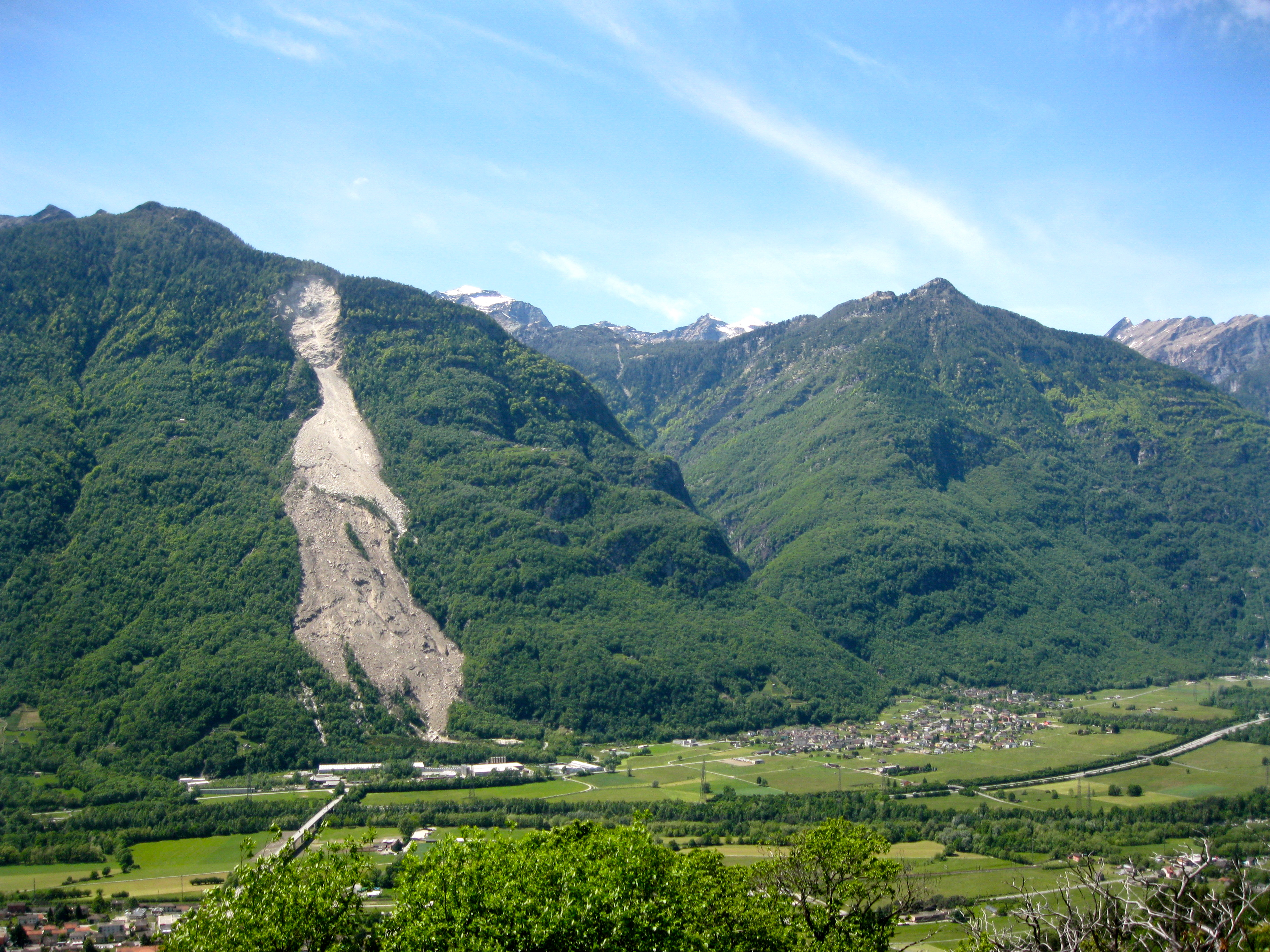 La frana del Valegion, Preonzo, la valle di Moleno e la Cima di Visghéd